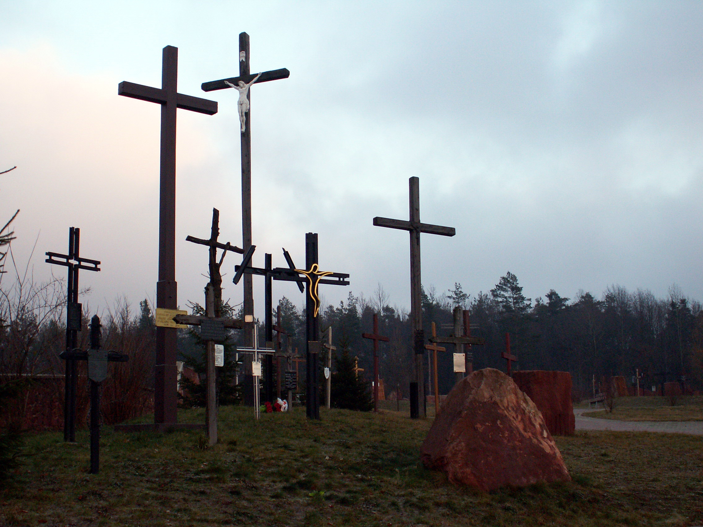 Mausoleum in Michniów, Poland